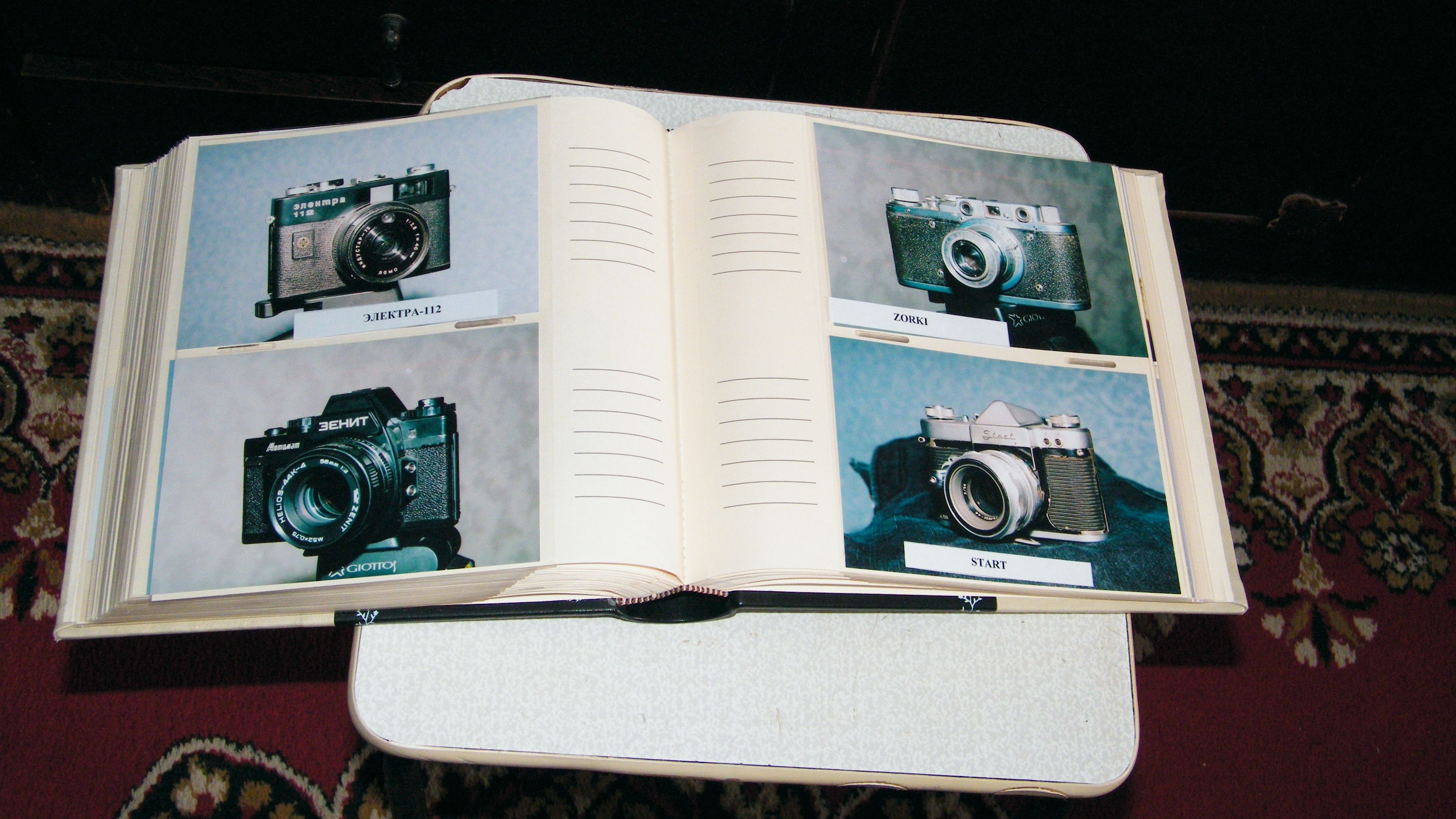 Мой фотоальбом с моими фотографиями советских фотоаппаратов